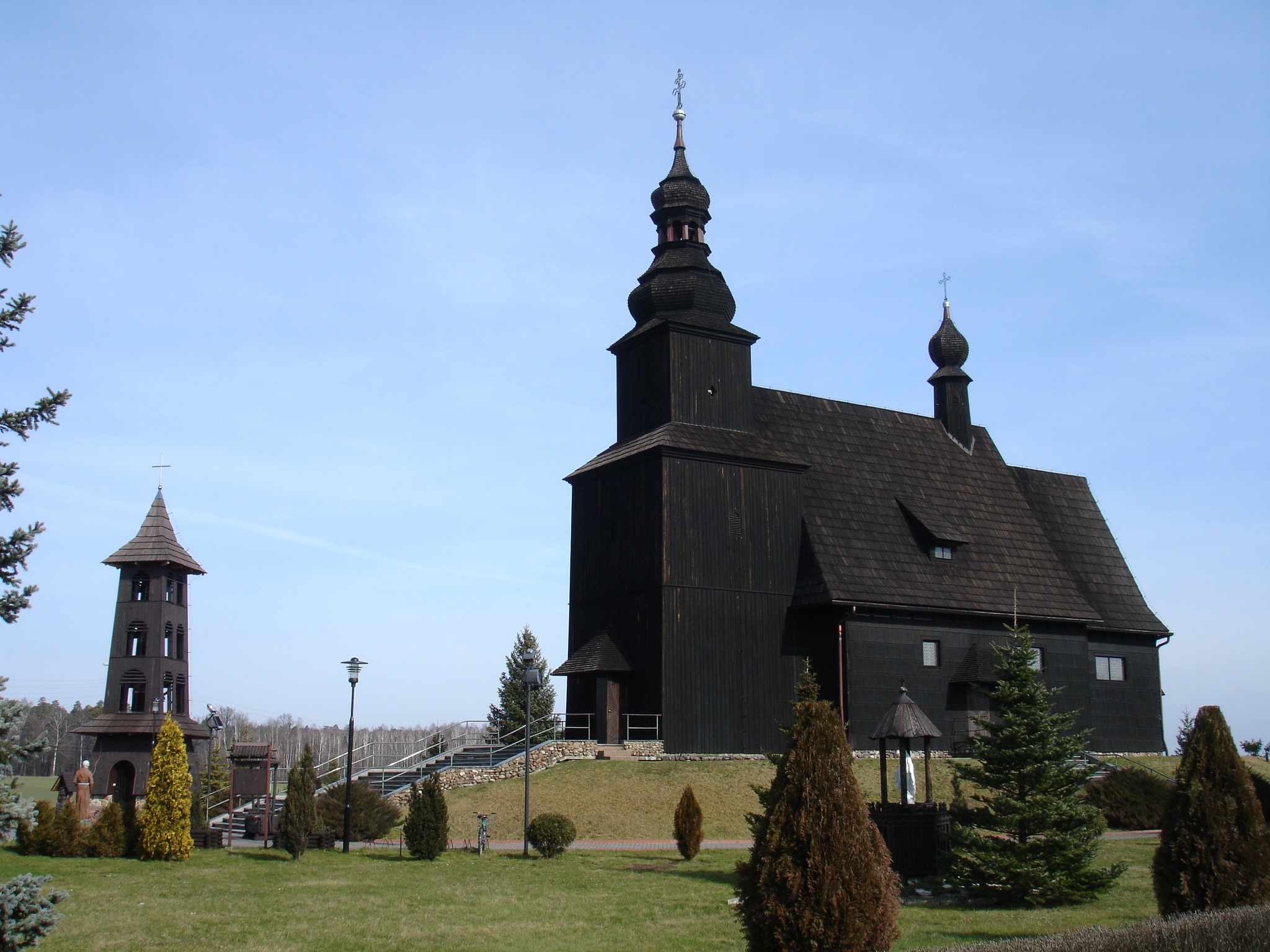 Gwoździany latin church (from Kościelisk n/Olesko)